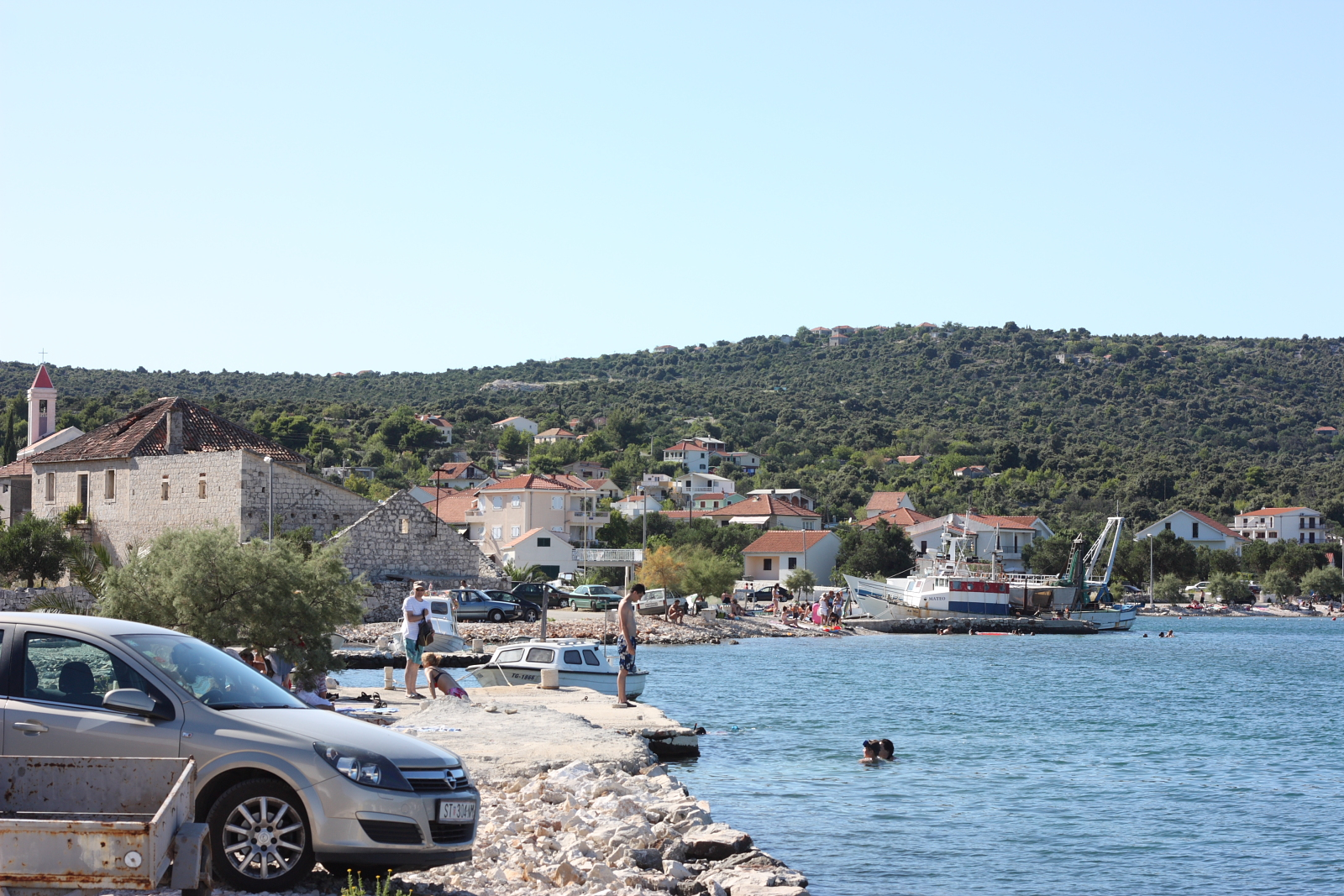 Vinisce